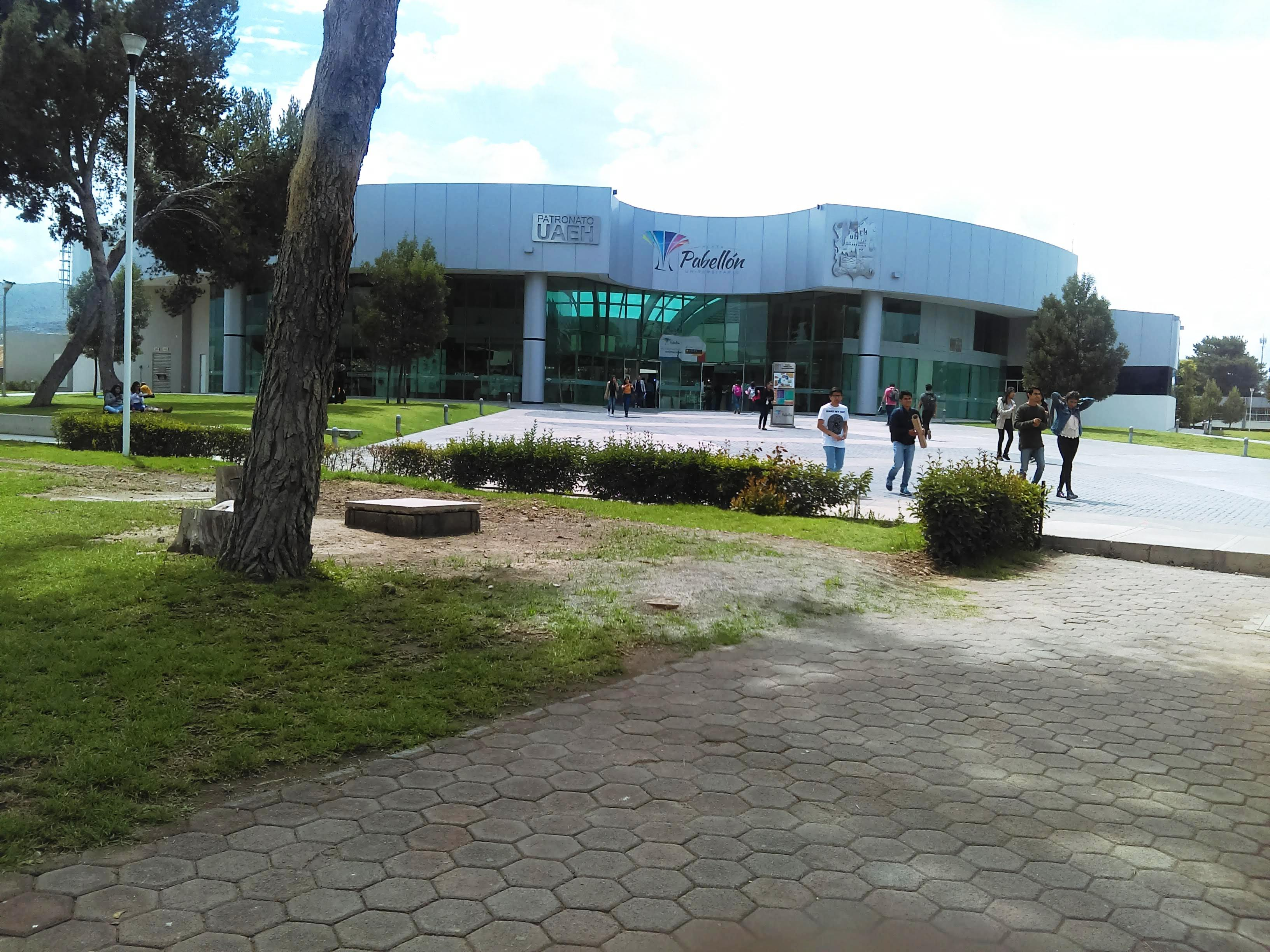 Ciudad del Conocimiento de la UAEH.